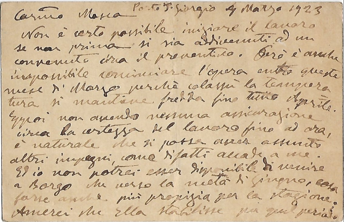 Cartolina postale spedita da Porto San Giorgio il 4 aprile 1923 da Sigismondo Nardi al pittore Antonio Mosca via dei Cappuccini, 6 Bologna per prendere accordi per i lavori di restauro e decorazione della parrocchia di Borgo Valsugana